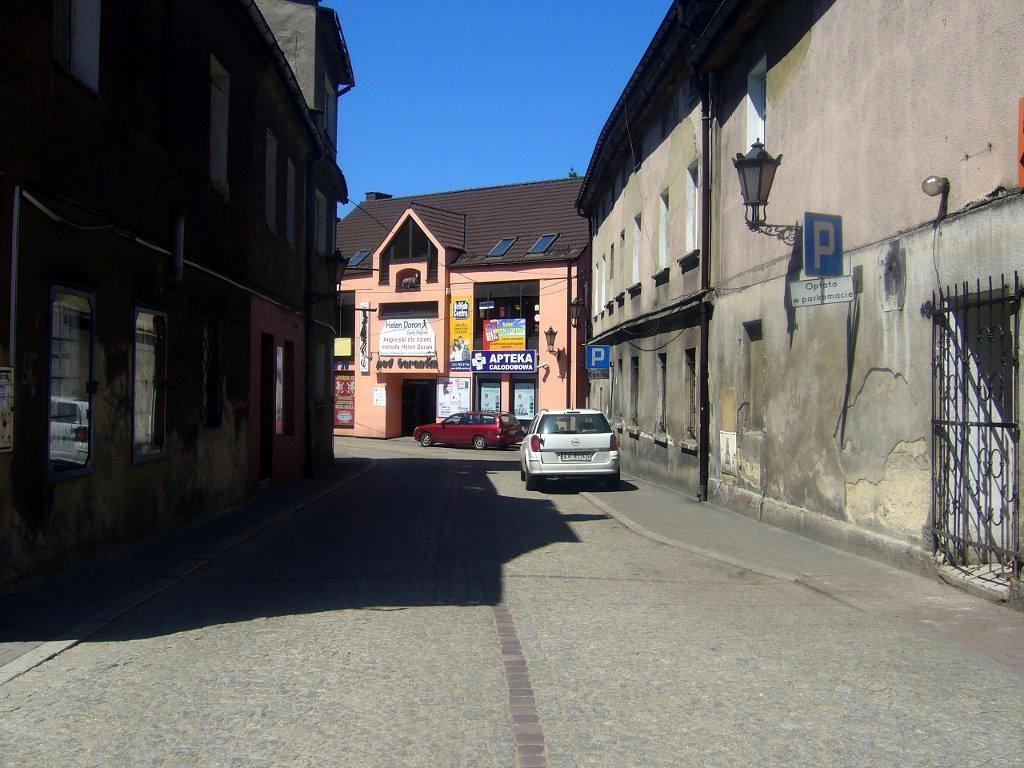 Ulica Piwowarska, widok od ul. Piastowskiej w czerwcu 2010.